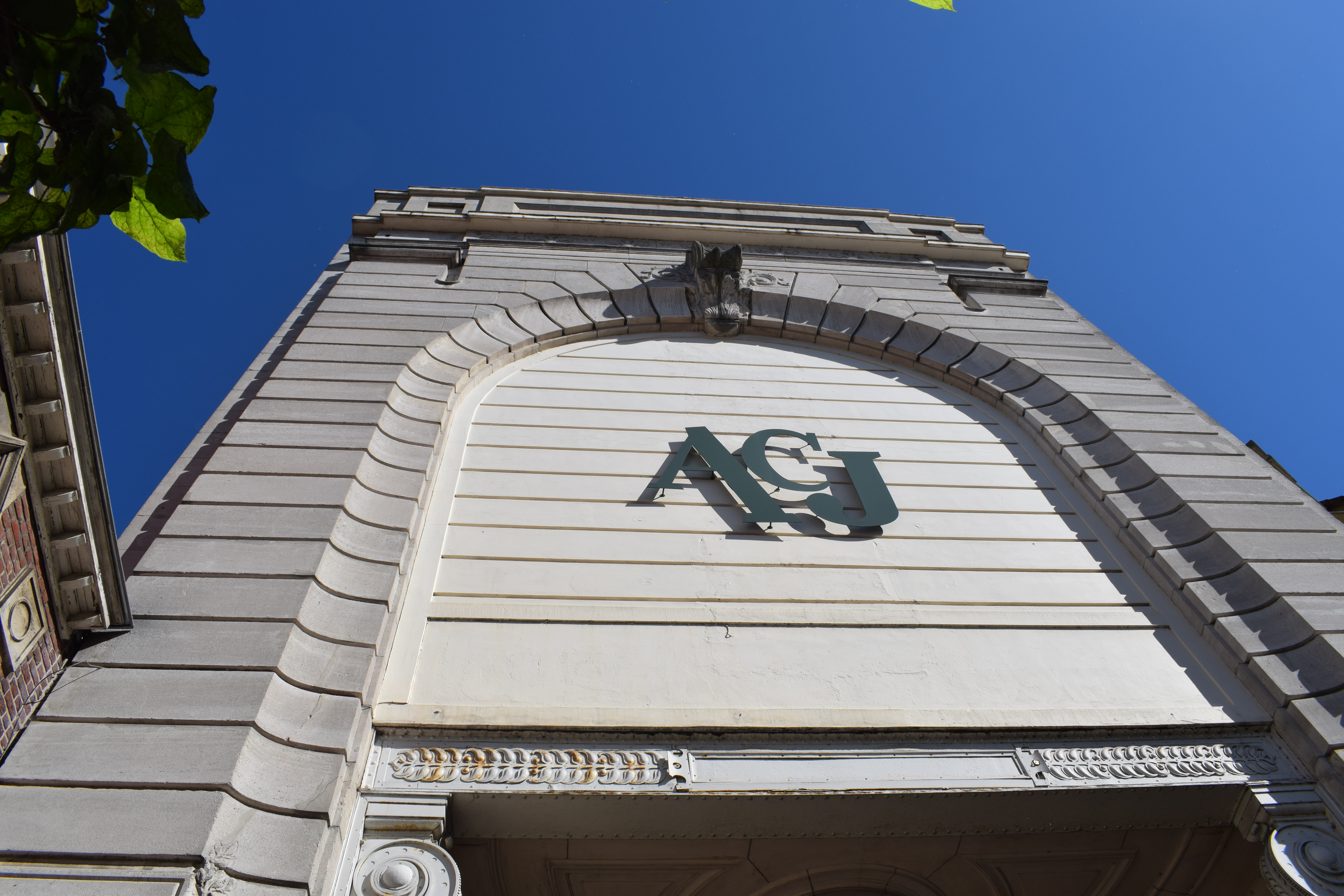 Athénée Charles Janssens entrée 06